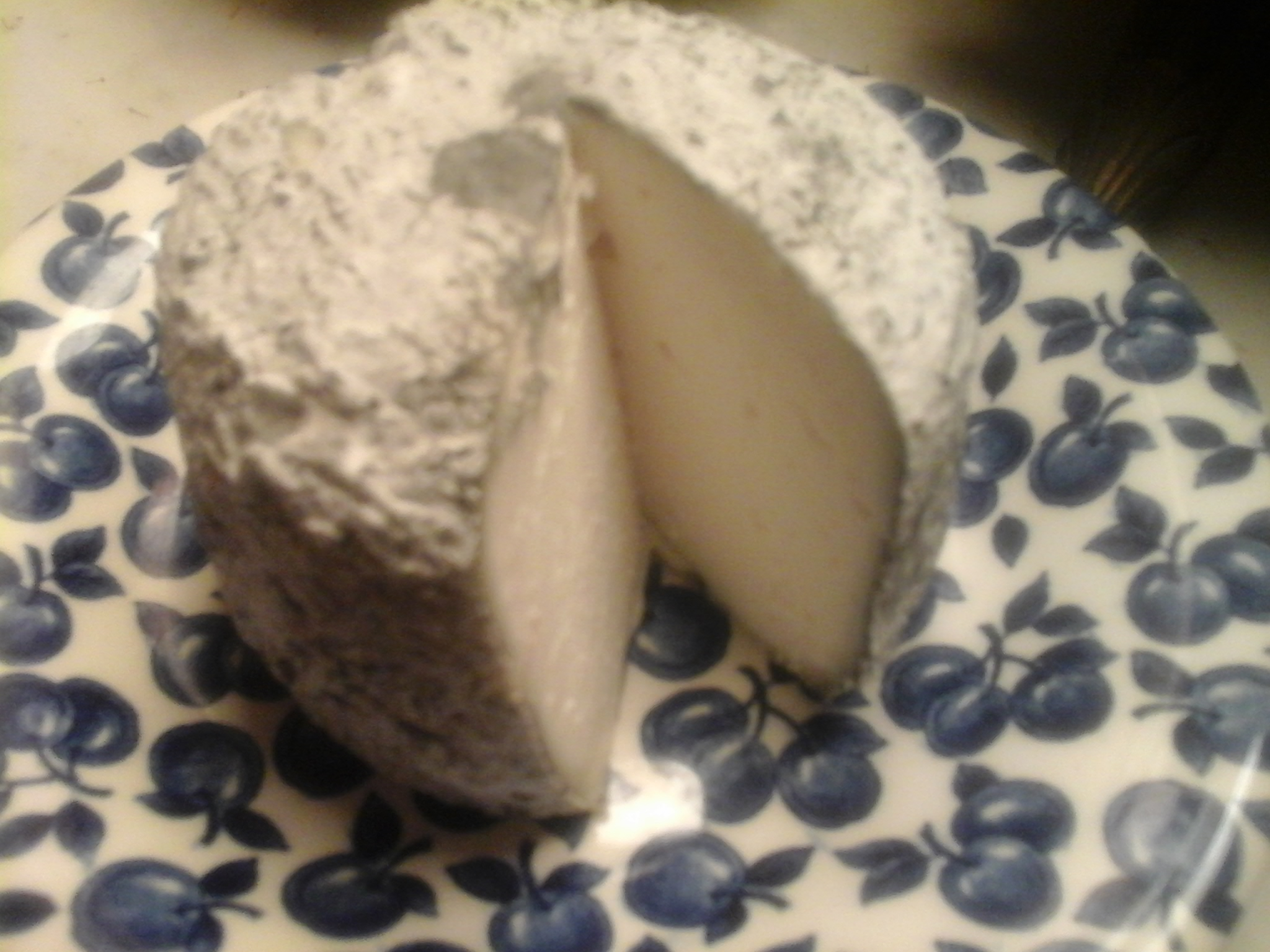 Bonde de Sologne.